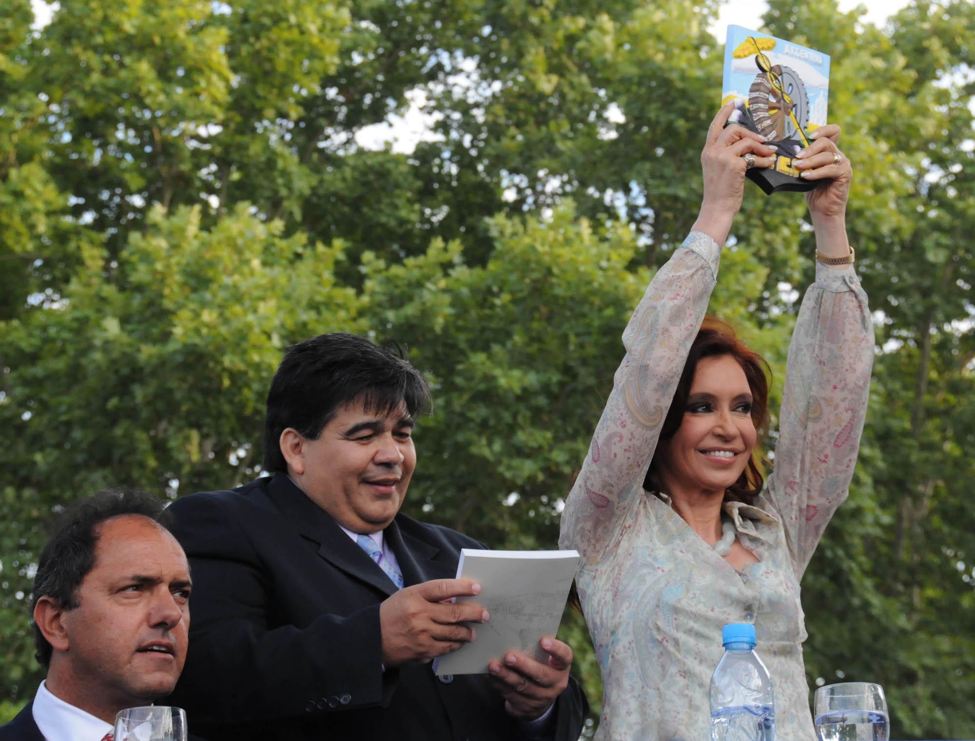 El Gobernador de la Provincia de Buenos Aires, Daniel Scioli, el Intendente del Partido de José C. Paz, en la zona oeste del Gran Buenos Aires, Mario Alberto Ishii y la Presidenta de la República Argentina, Cristina Fernández de Kirchner, en un acto oficial.